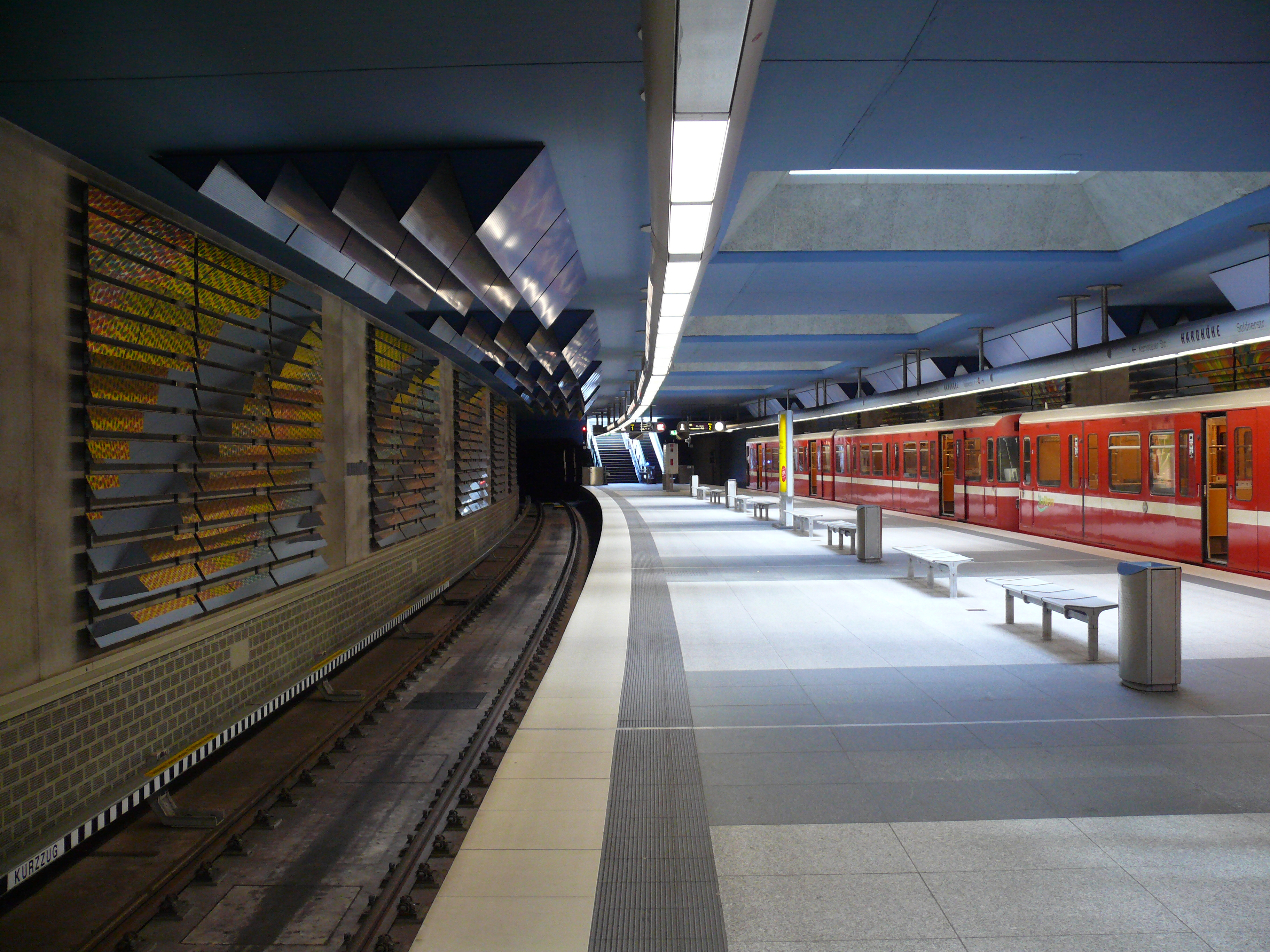 Bahnsteigebene am U-Bahnhof Hardhöhe in Fürth, mit den Spiegellamellen links, dem Faltwerk an der Decke (welches den Schwung der Gleise aufnimmt), sowie den Tageslichtern über der Bahnsteigmitte.